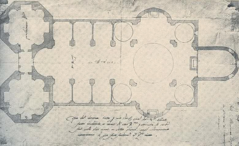 Progetto della nuova Chiesa di San Vittore al Corpo a Milano, di Vincenzo Alessi.